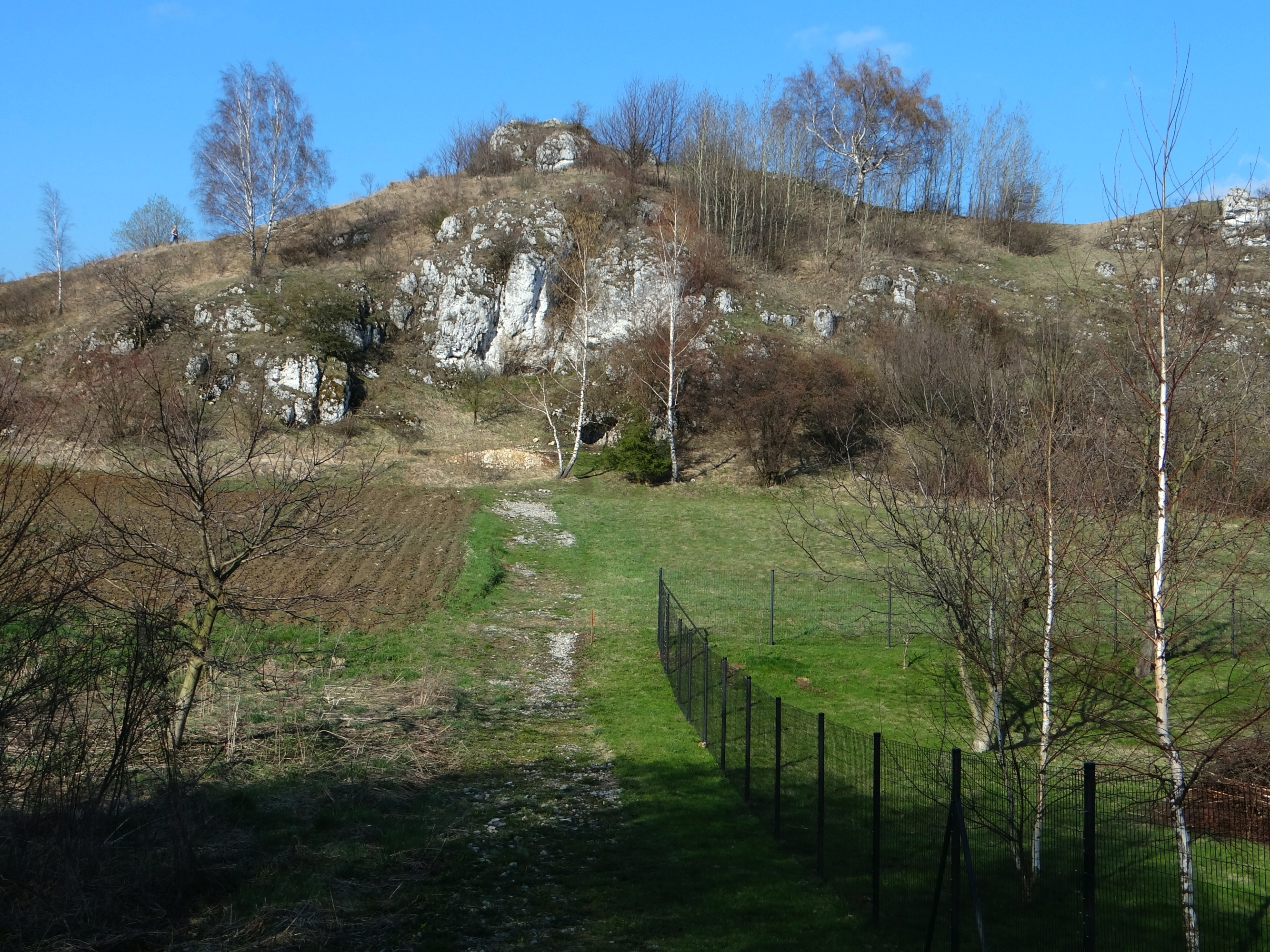 Żytnia Skała